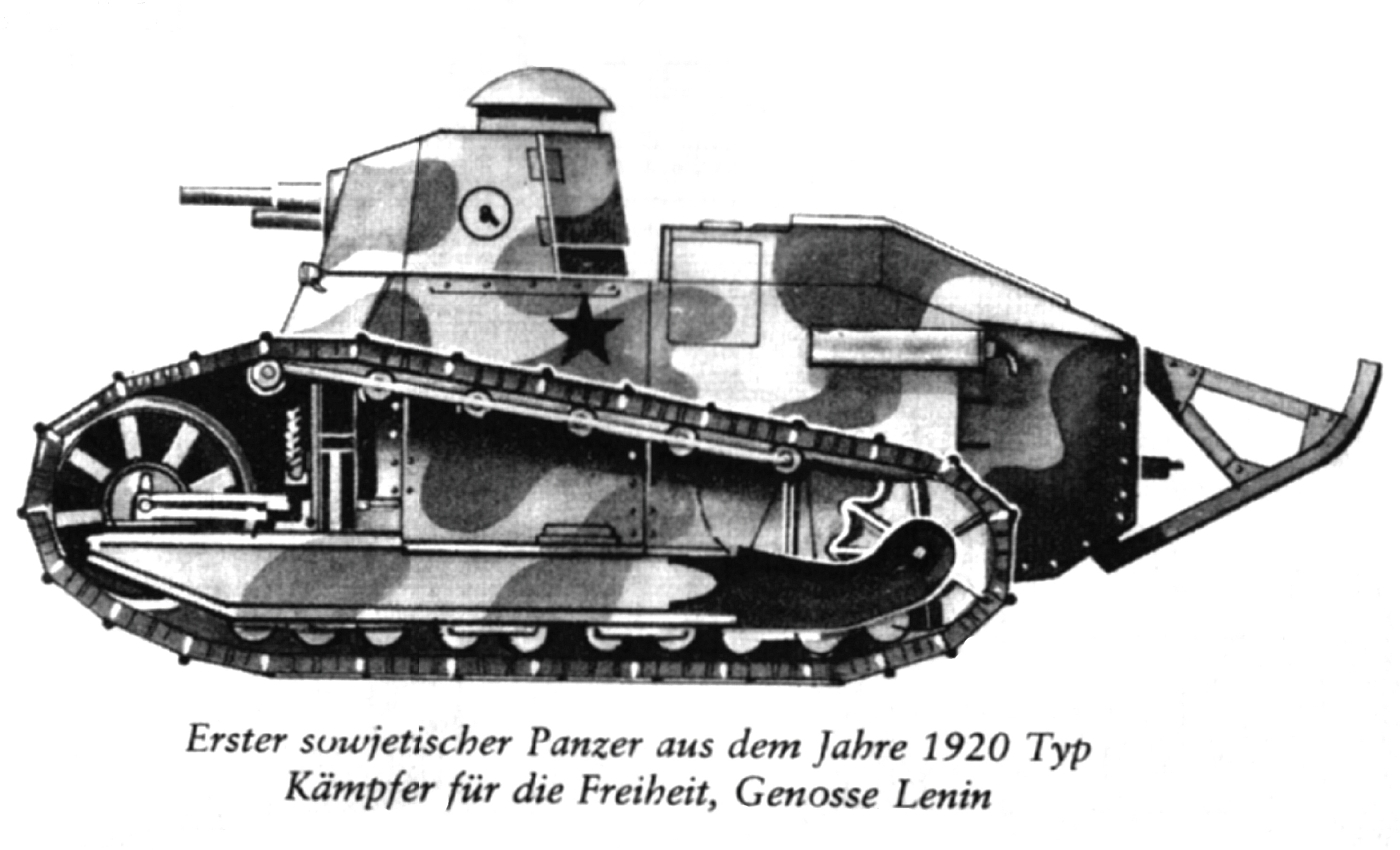 Bleistiftzeichnung nach einer Fotografie, angefertigt für eine Propaganda-Wandzeitung anlässlich des Tages der Sowjetarmee 1978 durch den Gefr.Treudler